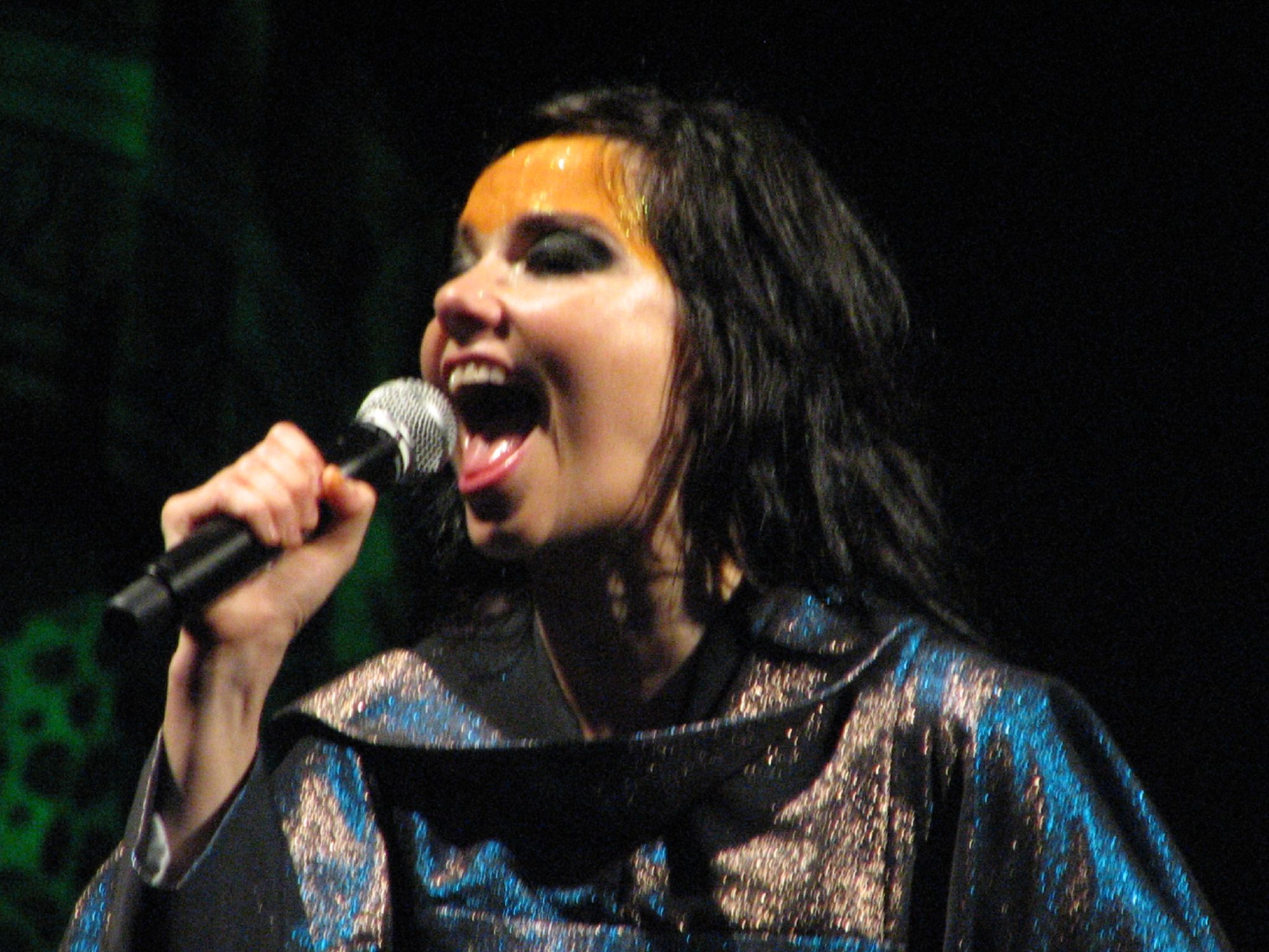 Björk performing in Vancouver in 2007